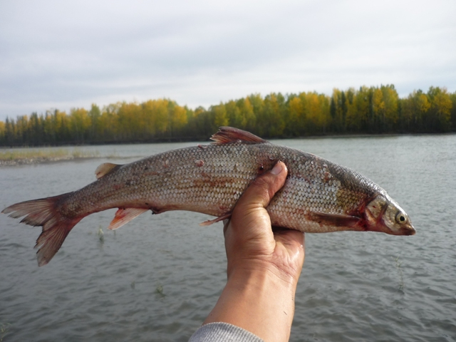 Саха тыла: Сүрү (лат. Prosopium cylindraceum, нуучч.: Обыкновенный валёк) — орто балык.